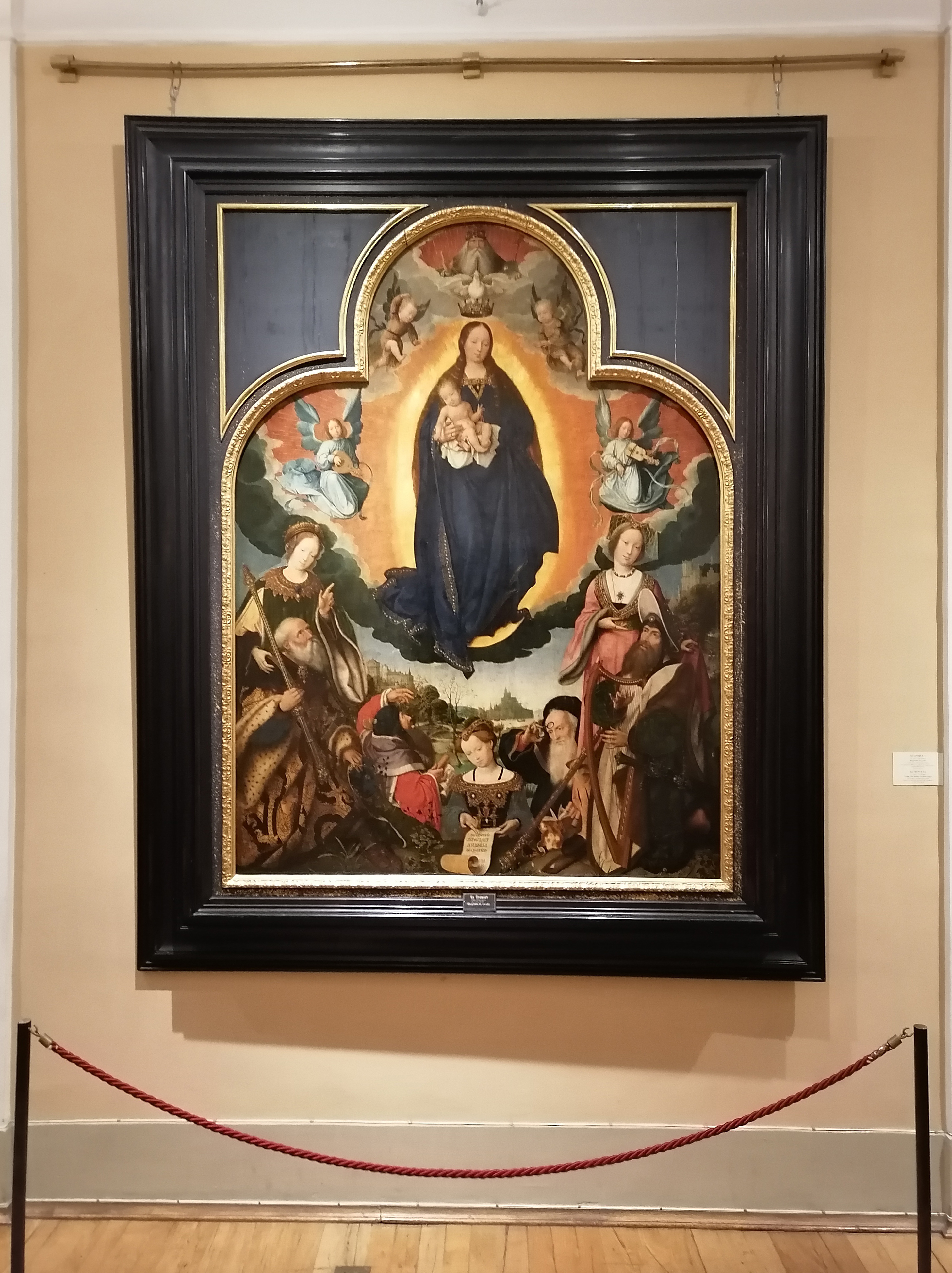 Малый Эрмитаж - зал 262